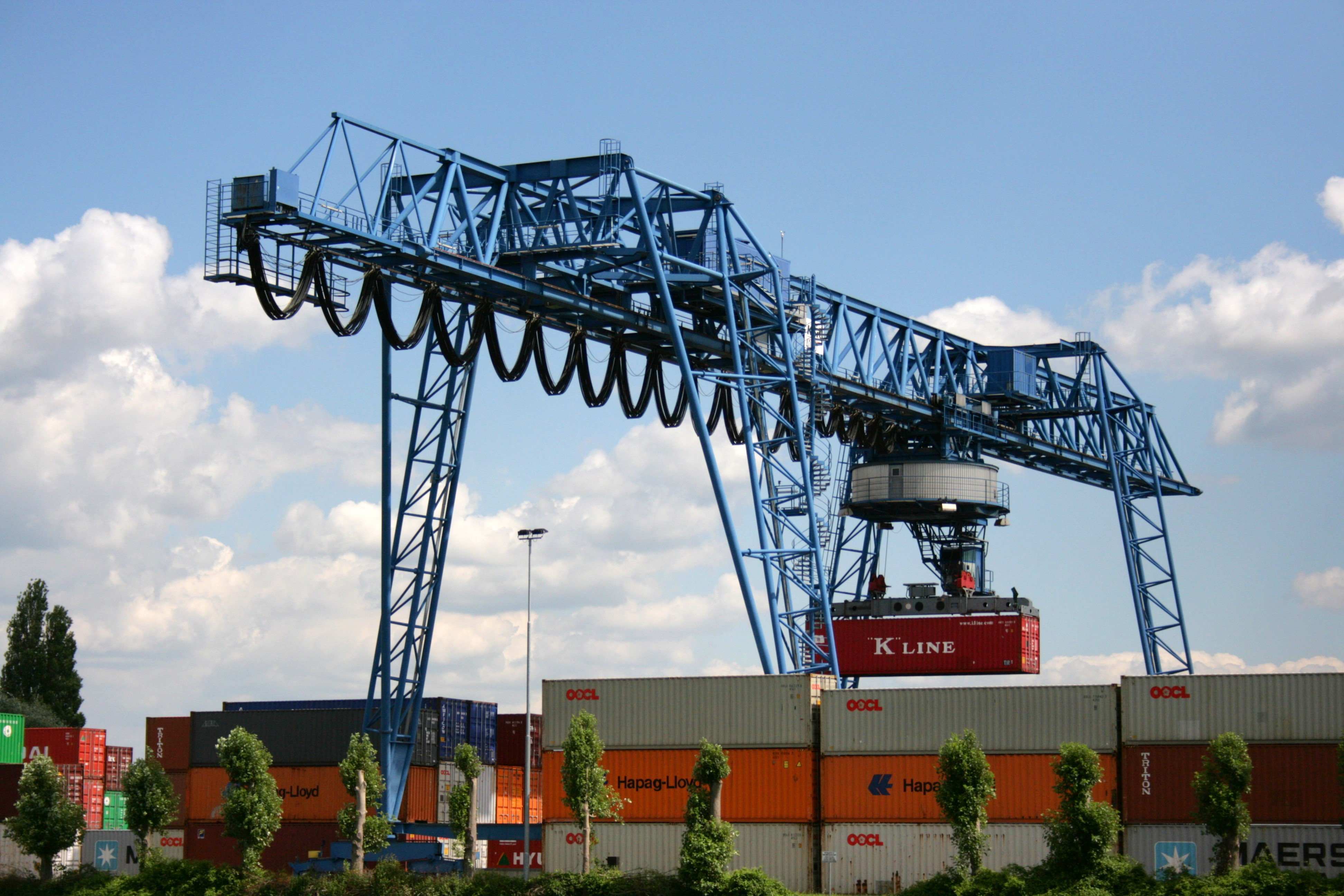 Rheinhafen in Emmerich am Rhein